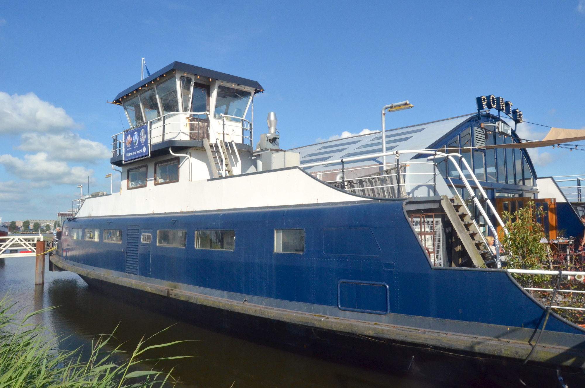 Houthavens (Amsterdam): Restaurant Pont 13, ex-GVB veerpont 13